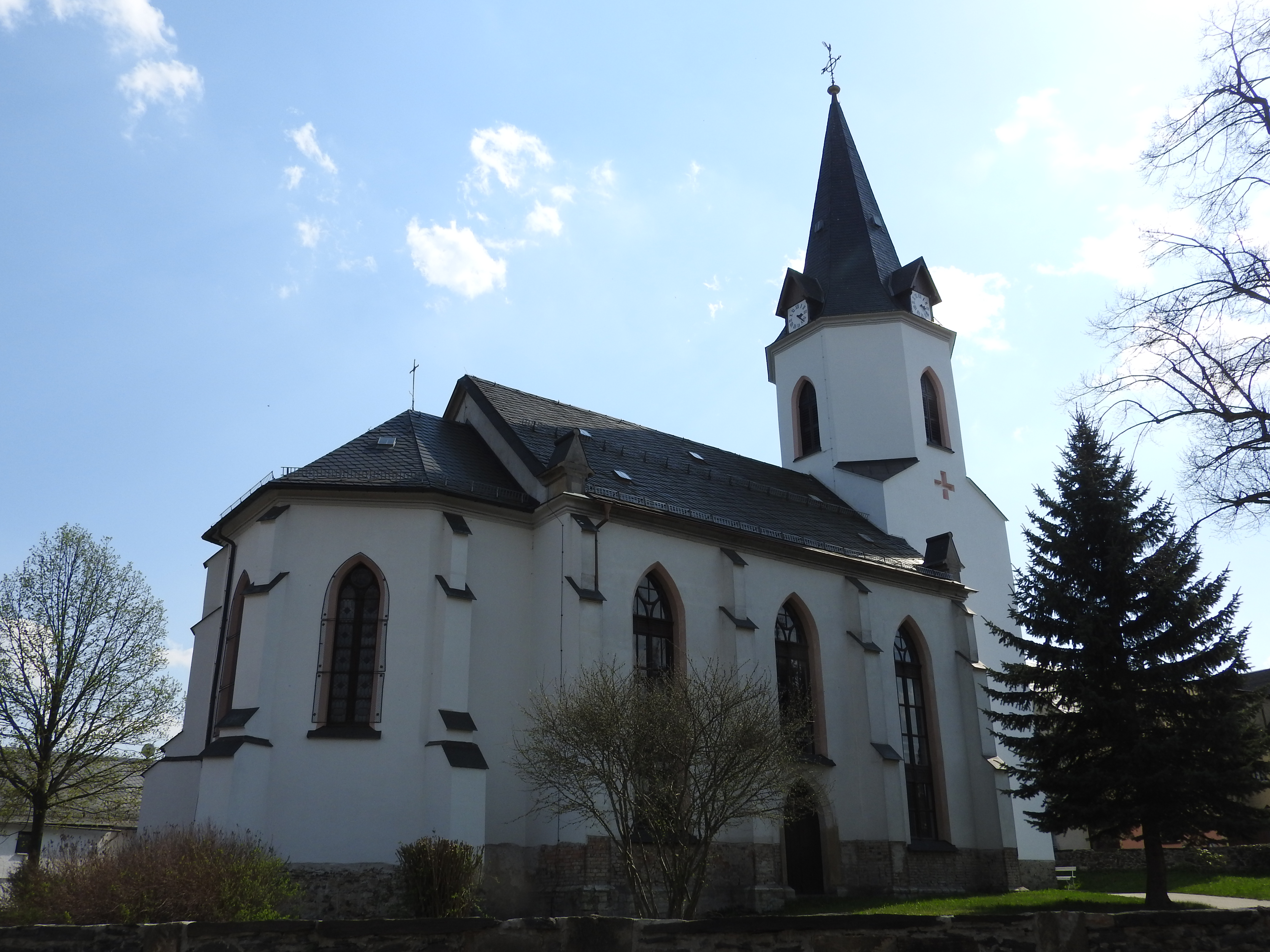 Kirche in Möschlitz, Thüringen